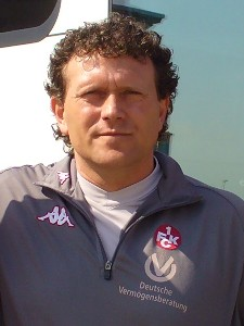 Olaf Marschall in Marburg